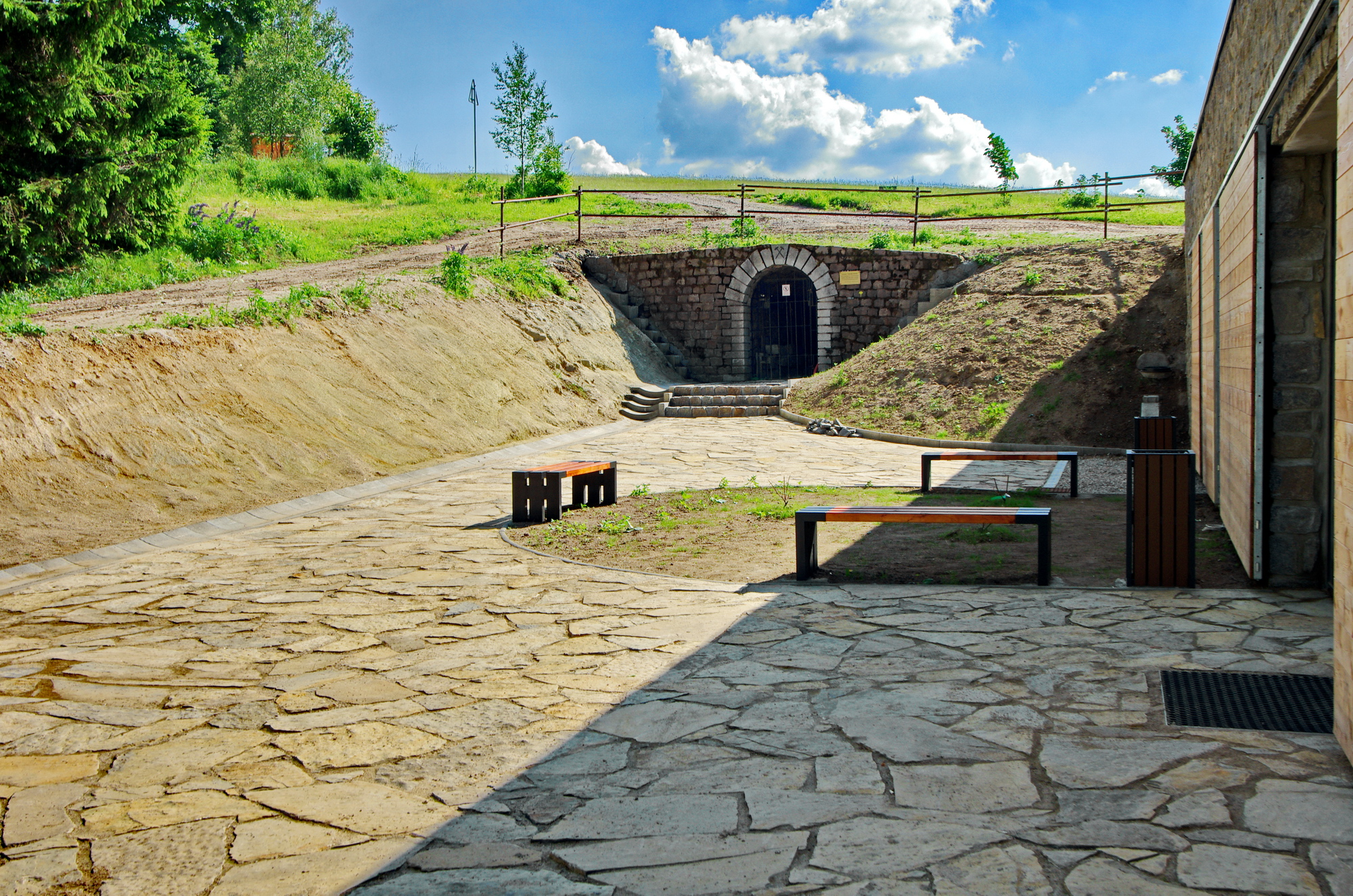 Cínový důl Jeroným, Čistá (Rovná).